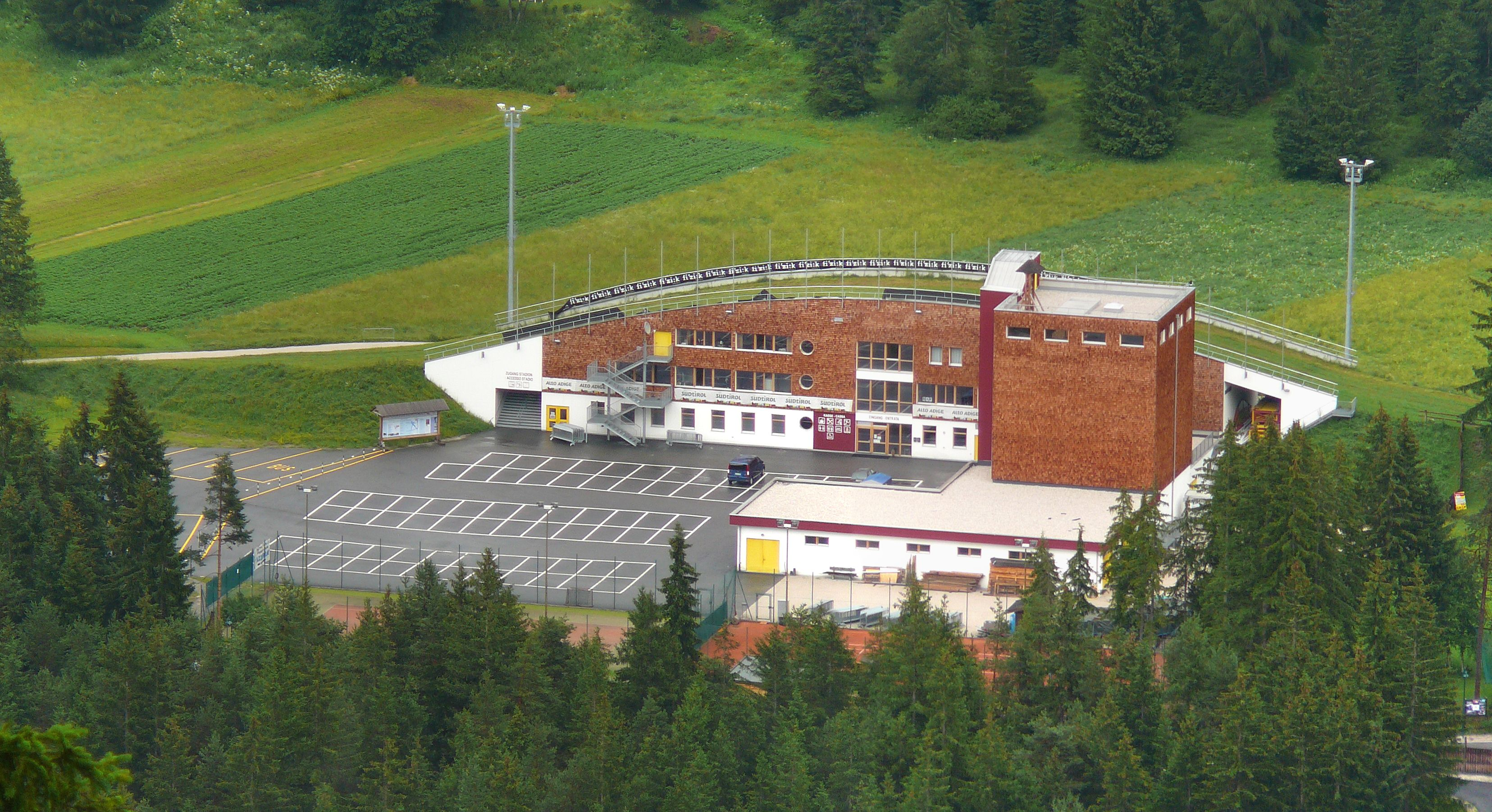 Nordic Arena Dobbiaco